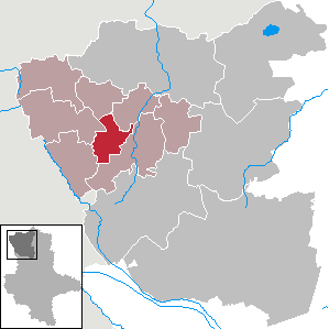 (Original text: Rohrberg im Landkreis Salzwedel)